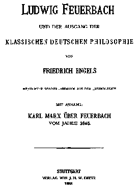 Friedrich Engels: Ludwig Feuerbach und der Ausgang der klassischen deutschen Philosophie, Stuttgart 1888, Dietz